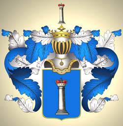 Герб рода Мищенко